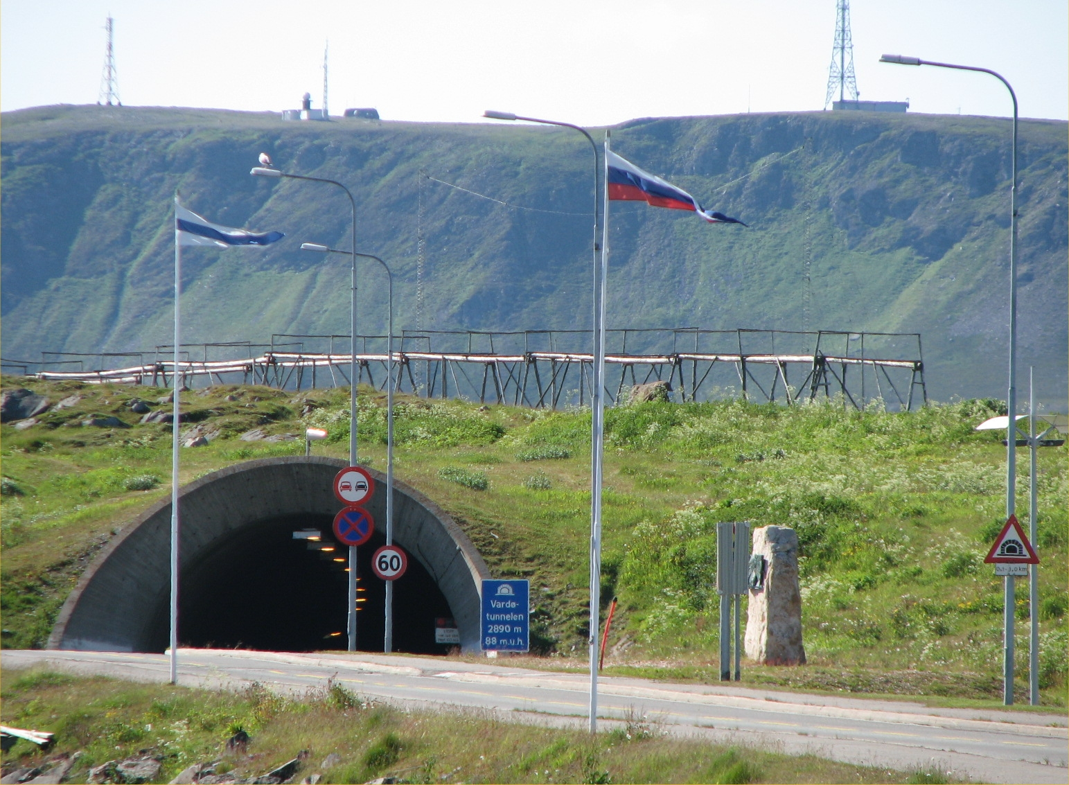 Nedgangen til Vardøtunnelen.